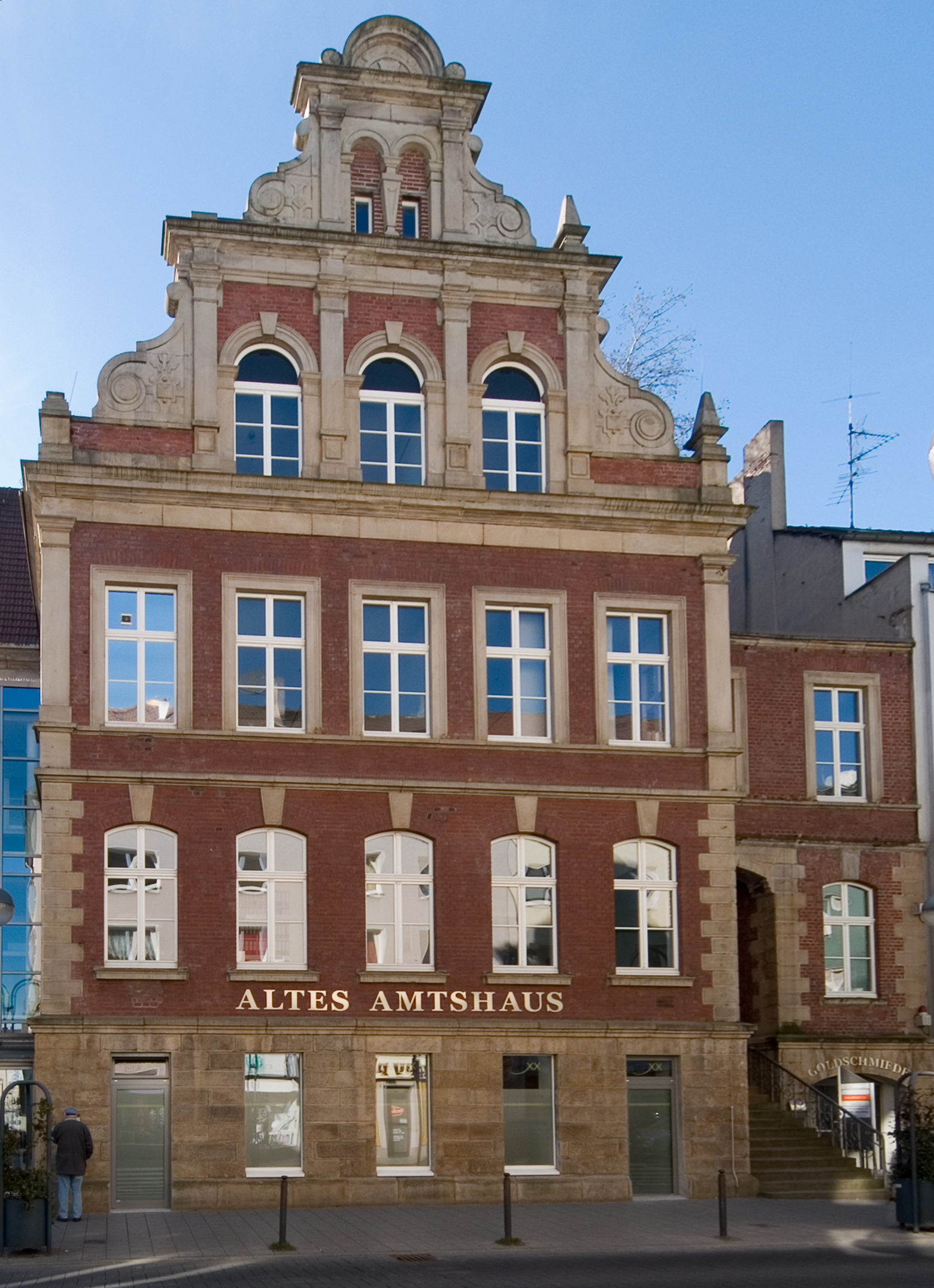 Das Alte Amtshaus in Bochum, Brückstraße, ursprünglich Verwaltungsgebäude für den Kreis Bochum